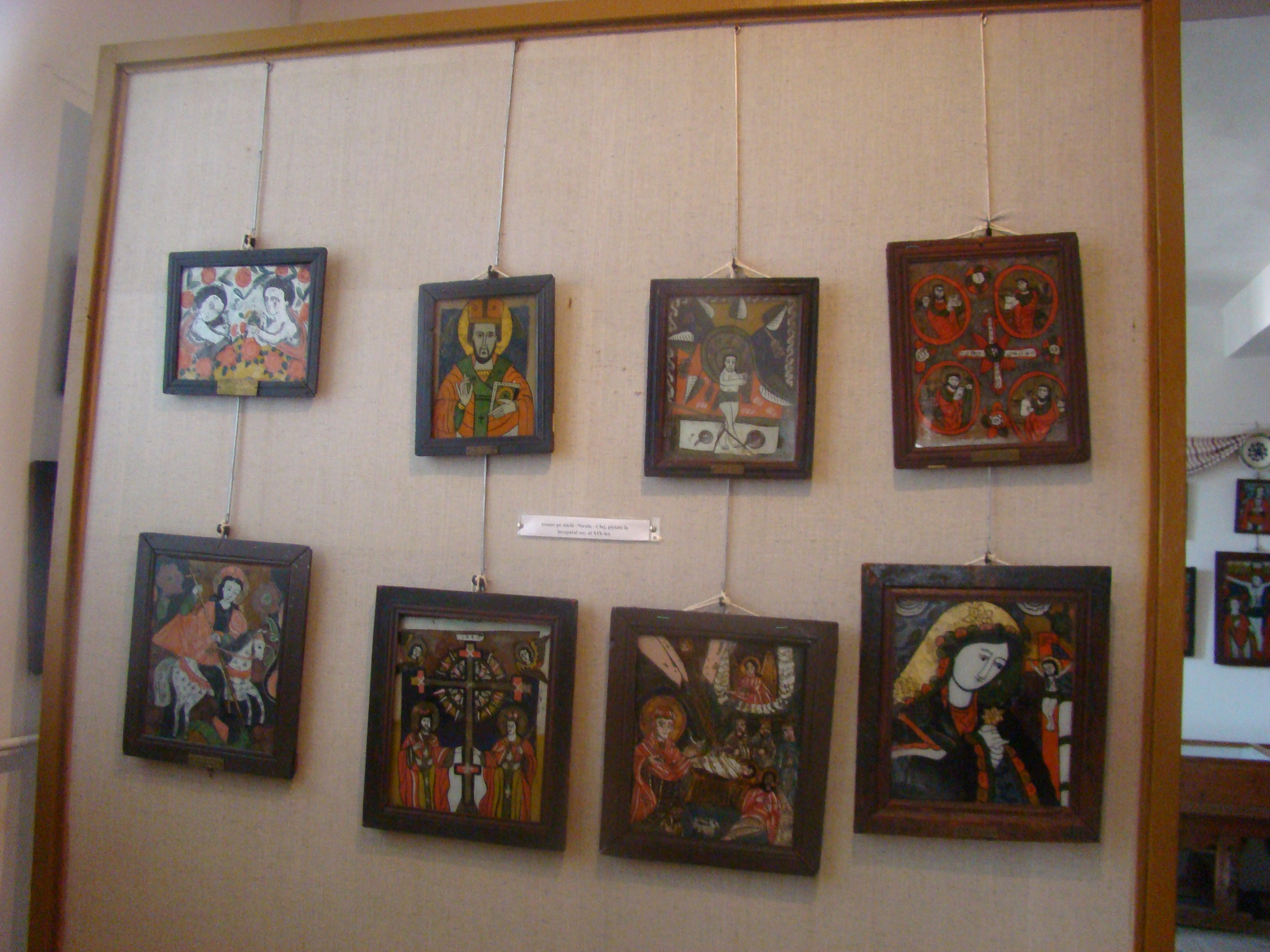 Muzeul de icoane pe sticlă „Pr.Zosim Oancea” din Sibiel